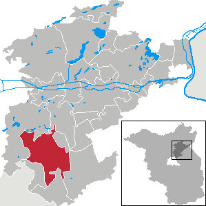 Bernau bei Berlin in Brandenburg (Country) - District Barnim